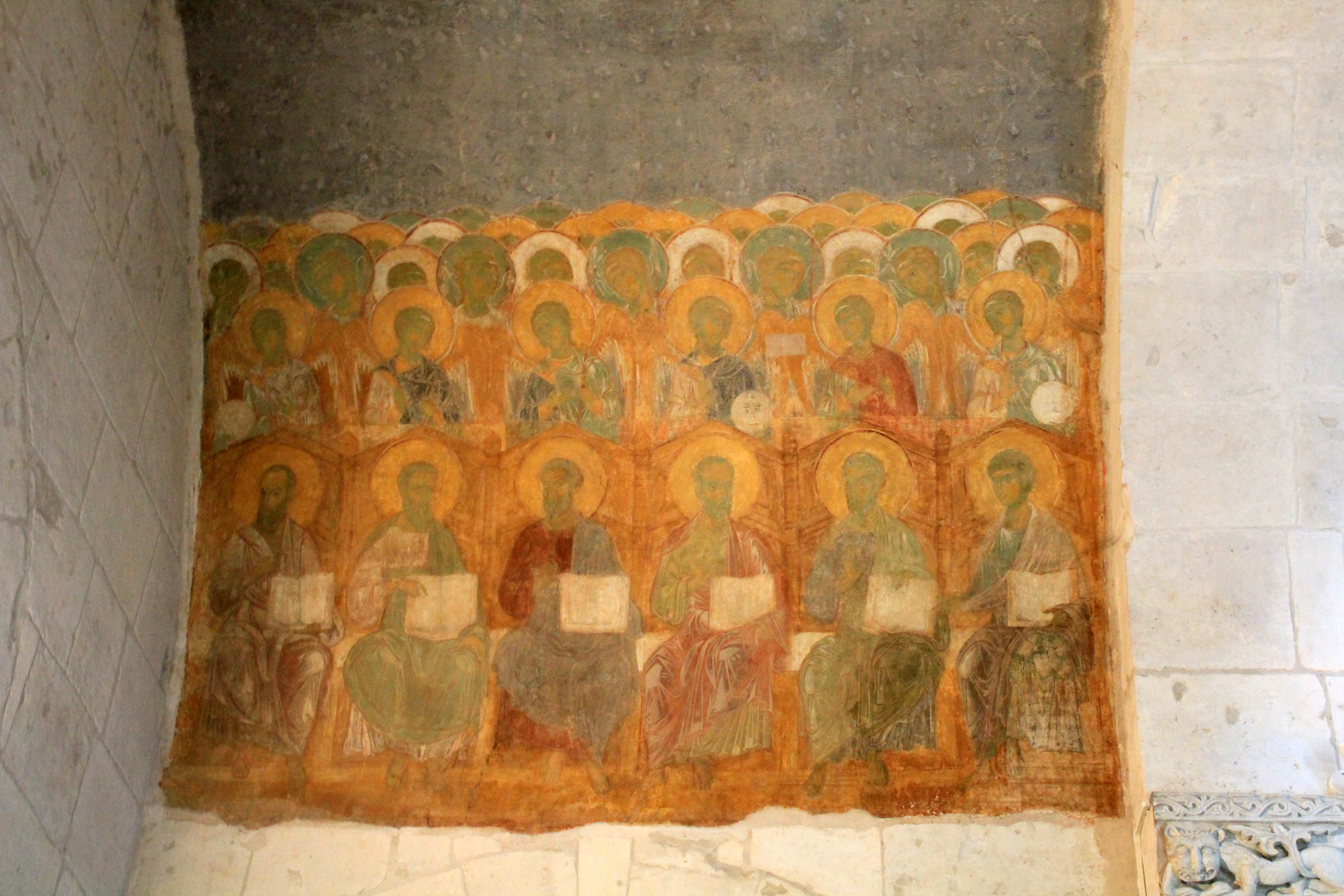 Собор Дмитриевский (Владимирская область, Владимир, улица Большая Московская, 60)